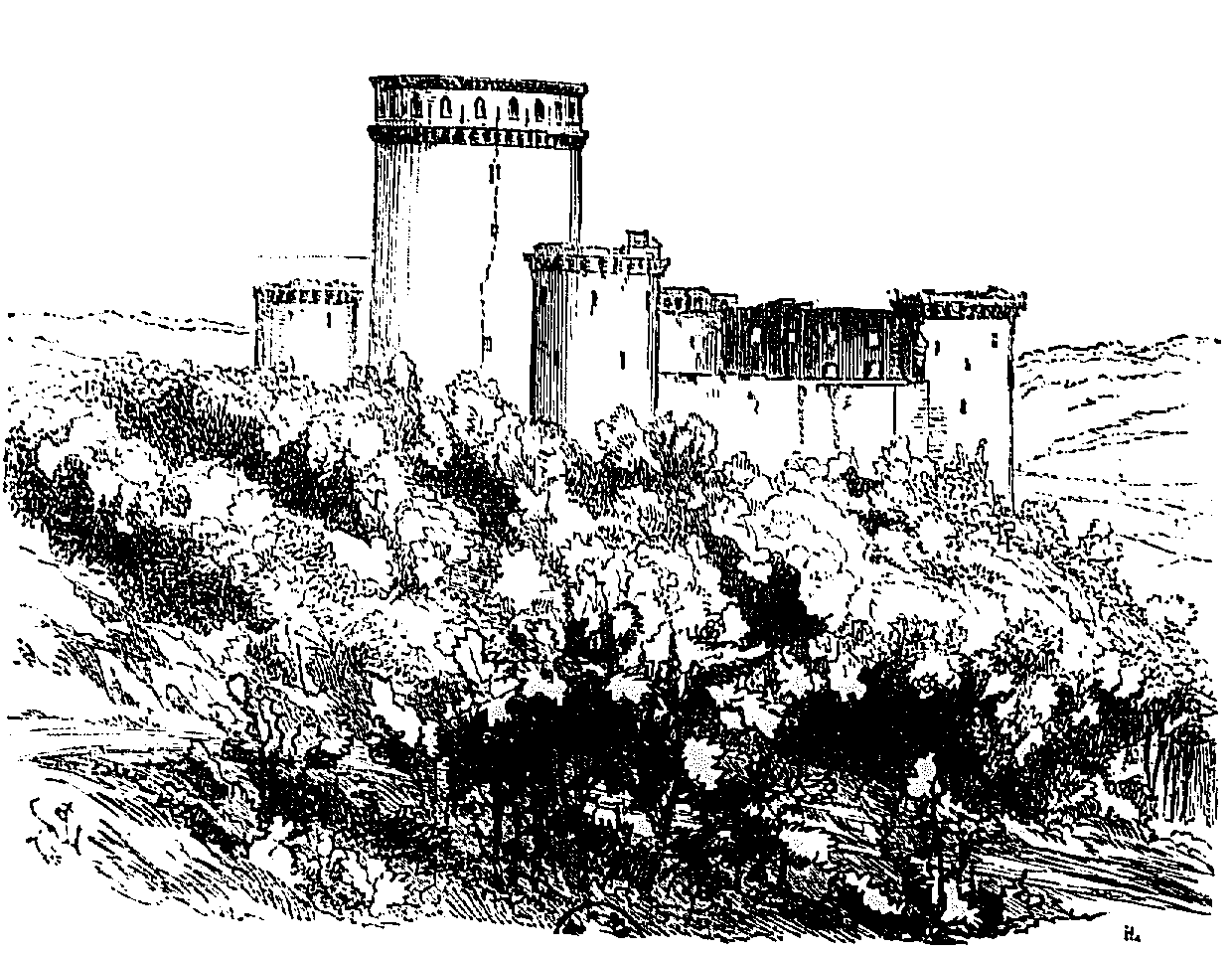 Dessin extrait de l'ouvrage Description du château de Coucy par Eugène Viollet le Duc. Le dessin est intitulé : Les ruines de Coucy Notice Gallica : Auteur(s) : Viollet-le-Duc, Eugène- Emmanuel (1814-1879) Titre(s) : Description du château de Coucy [Texte imprimé] / par M. Viollet-le-Duc,... Édition : 4e éd. Publication : Paris : Vve A. Morel, 1875 Description matérielle : 31 p. : ill. ; in-8 Note(s) : Les pl. sont comprises dans la pagination Sujet(s) : Coucy-le-Château-Auffrique (Aisne) -- Château Notice n° : FRBNF31590226